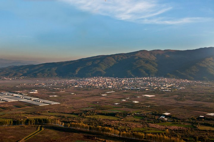 Птичи поглед - град Петрич с планина Беласица.jpg